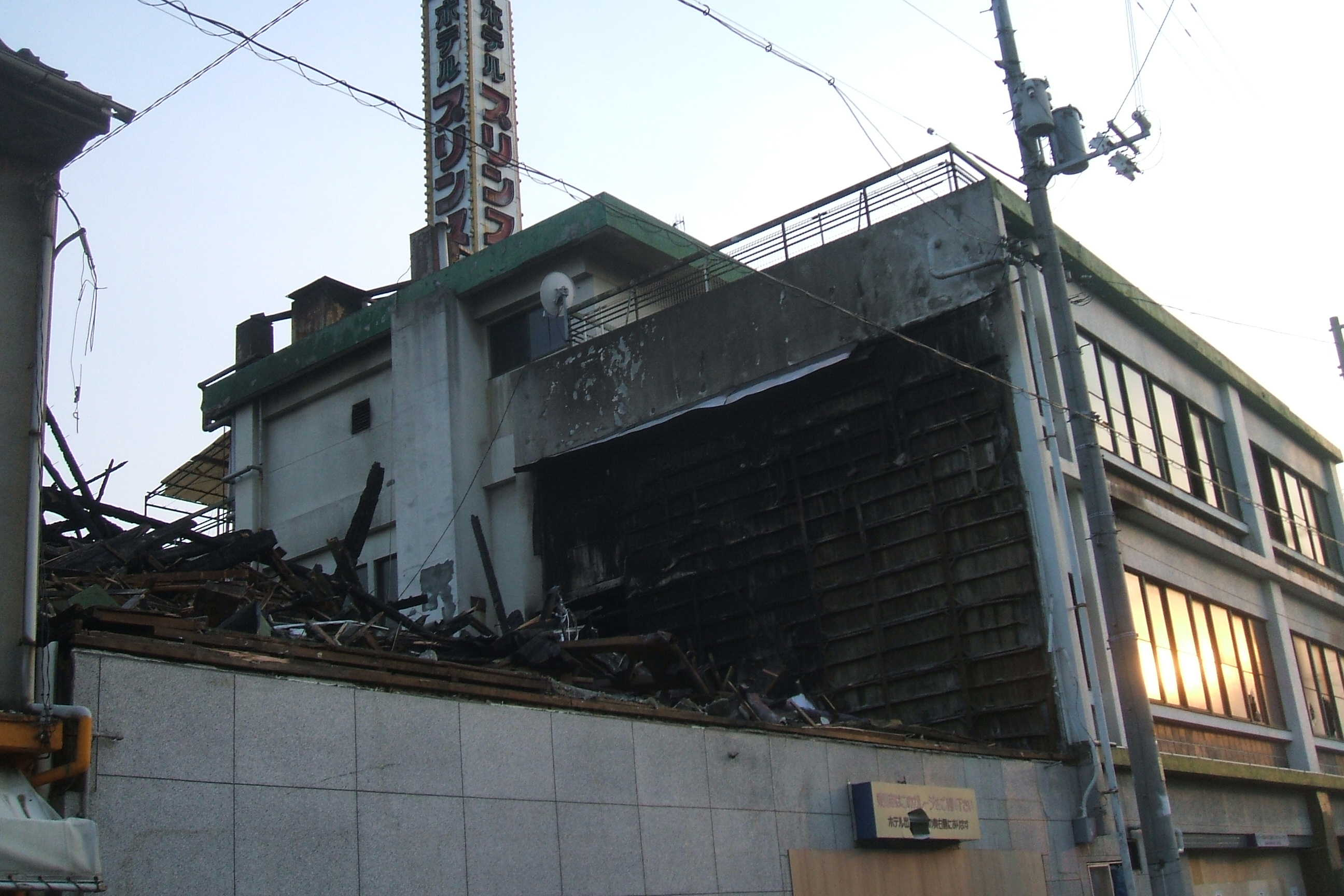 火災発生から二日後、崩壊した木造部分の様子